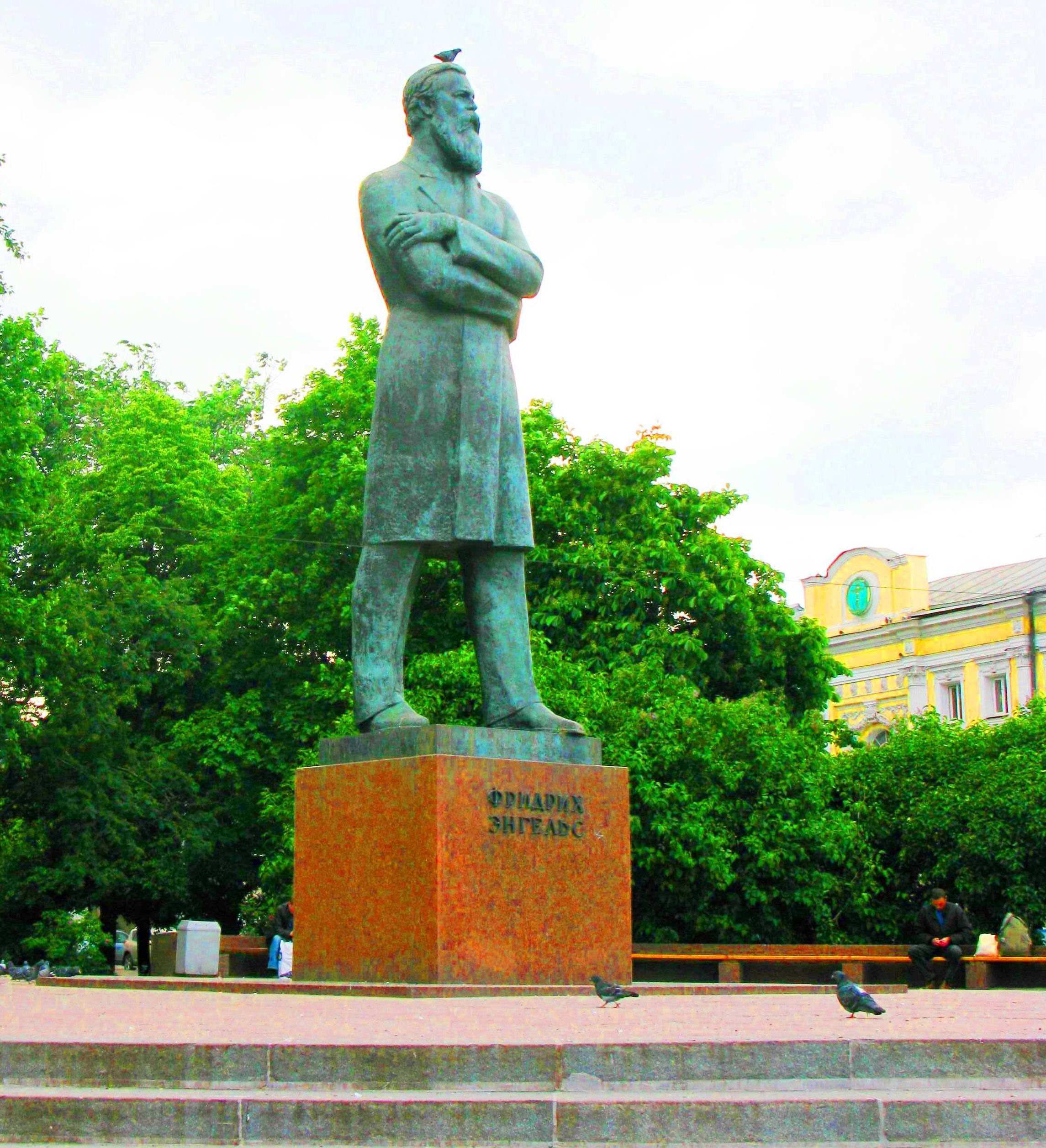 Памятник Ф.Энгельсу, м.Кропоткинская. Moscow, Russia